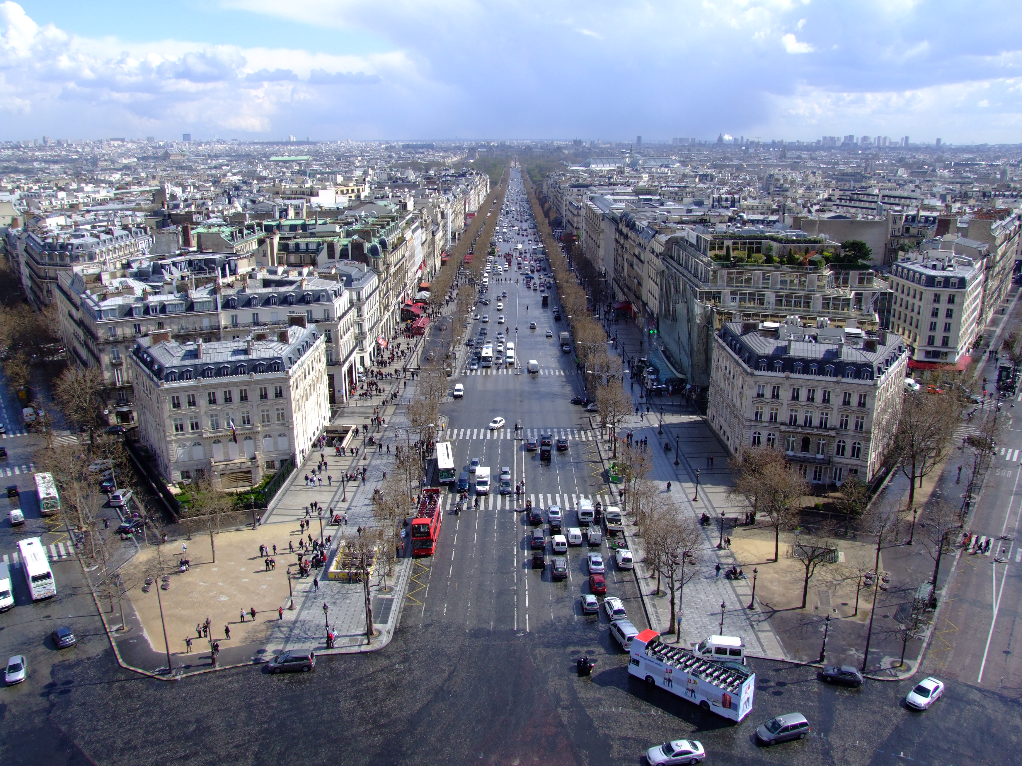 Avenue des Champs-Elysées from the Arc de Triomphe, Paris, France.